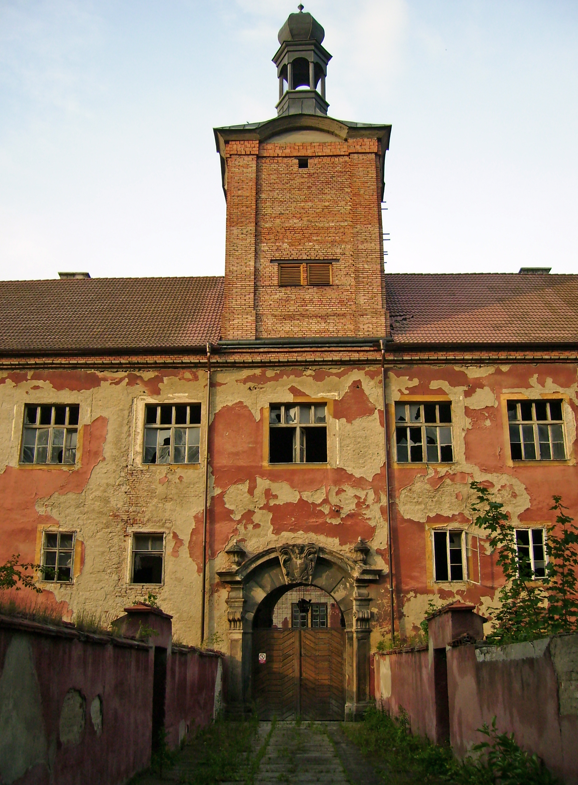 Zdevastovaný zámek ve středočeských Kounicích.